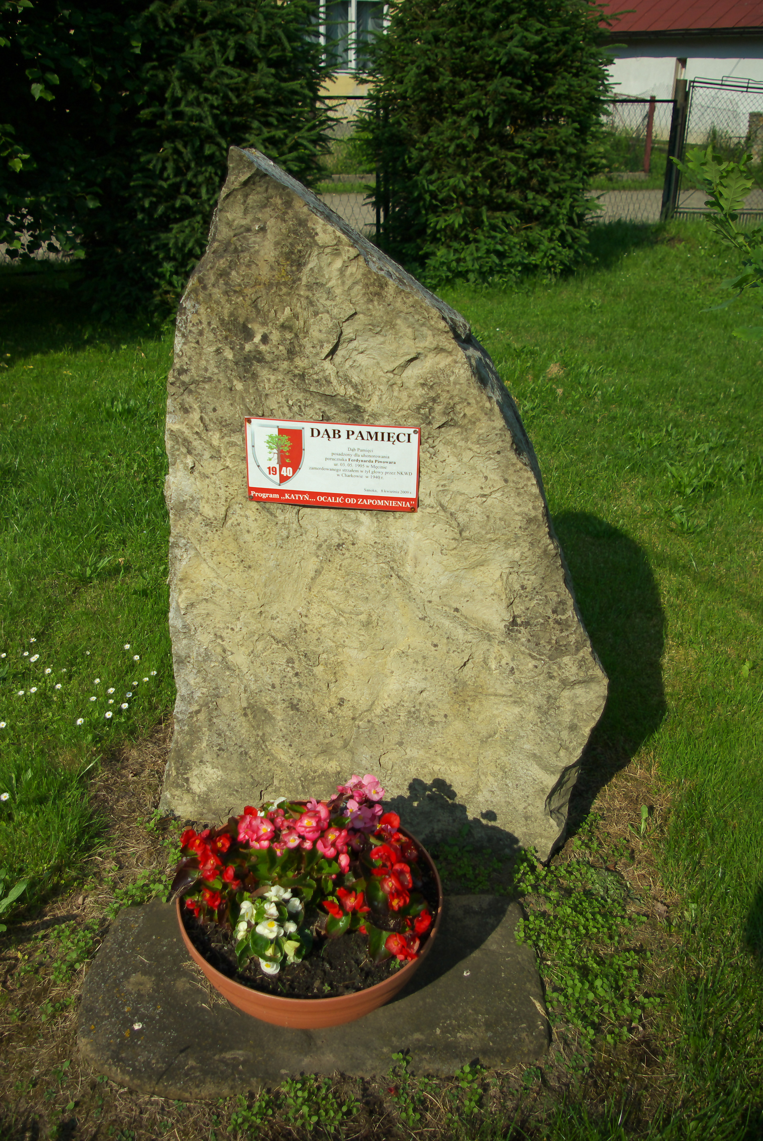 Kamień pamiątkowy w Falejówce przy Dębie Pamięci ofiary zbrodni katyńskiej; uhonorowany Ferdynand Piwowar